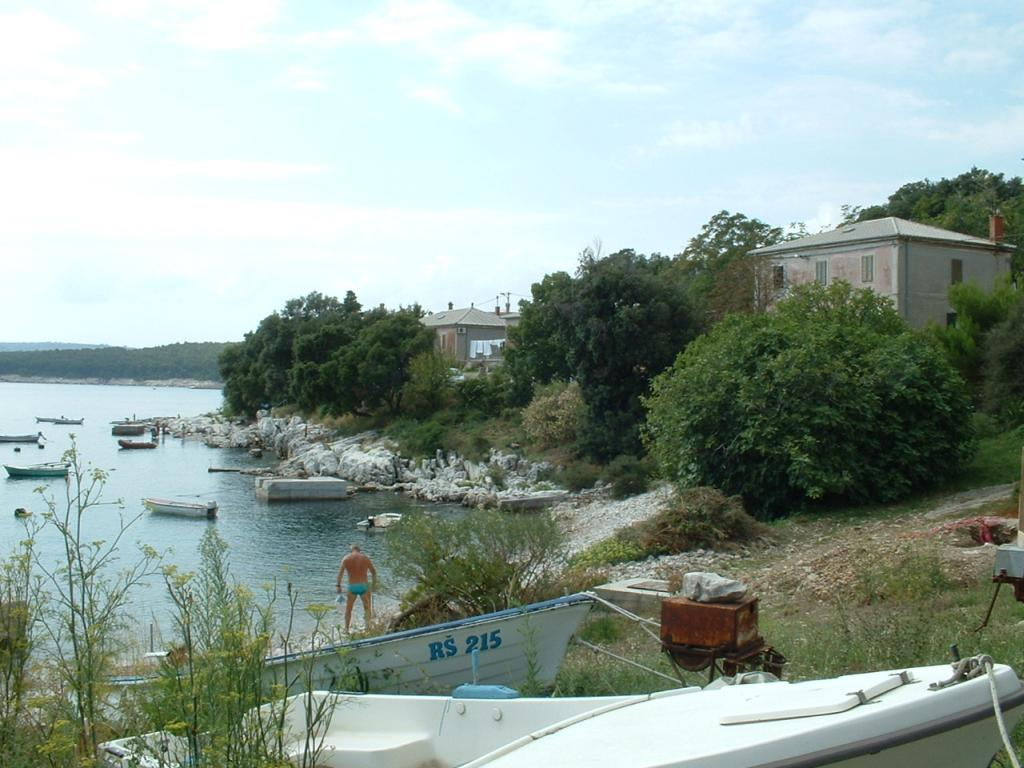 Koromačno, Istra, Croatia